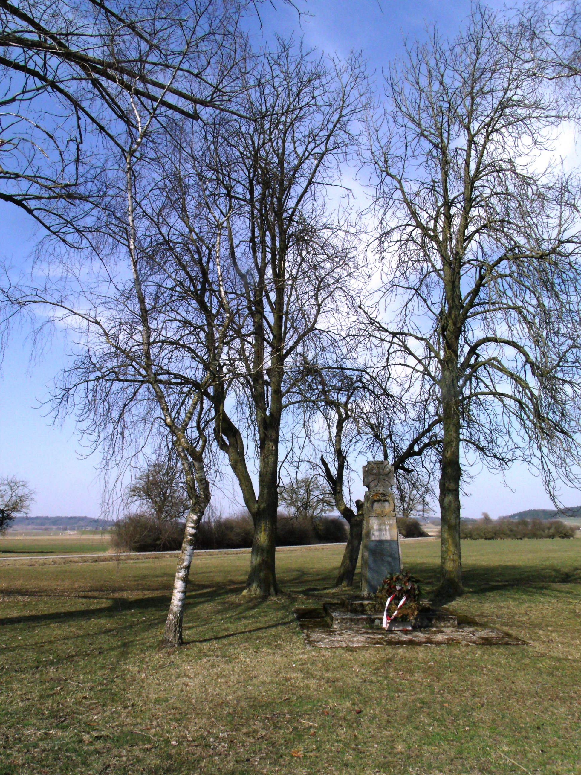 Röttenbach, Ortsteil der Stadt Leutershausen im mittelfränkischen Landkreis Ansbach, Kriegerehrenmal